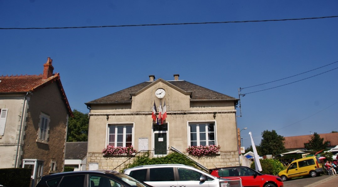 La Mairie